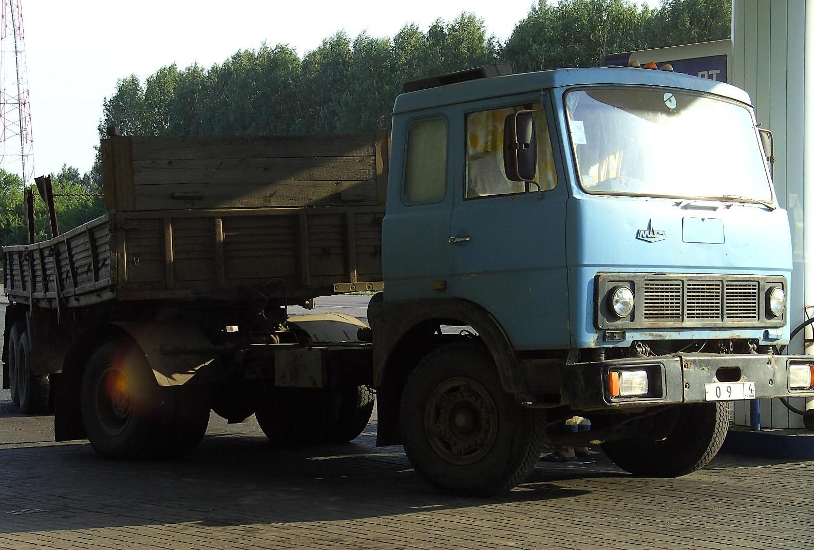 MAZ-5432